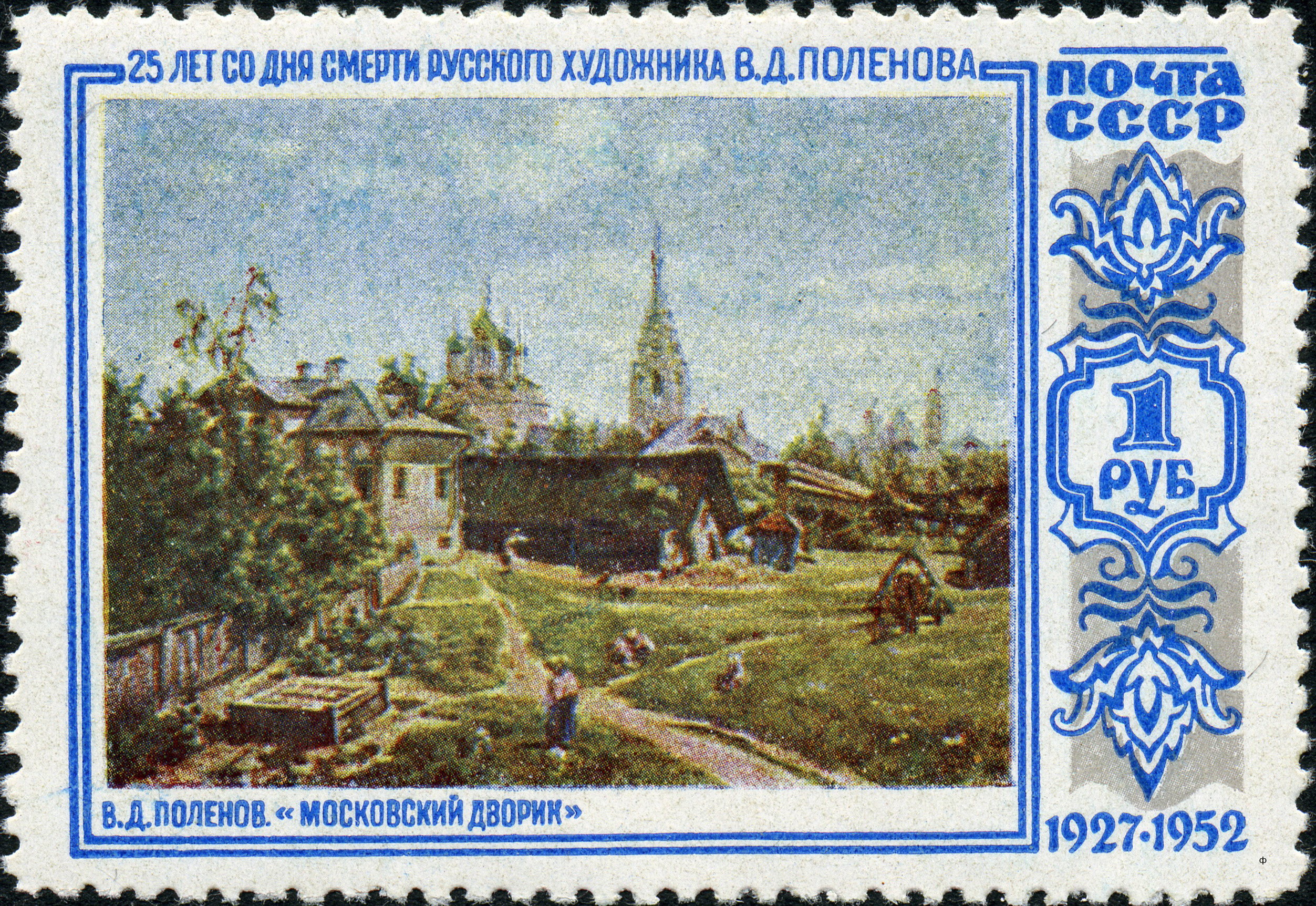 Марка СССР